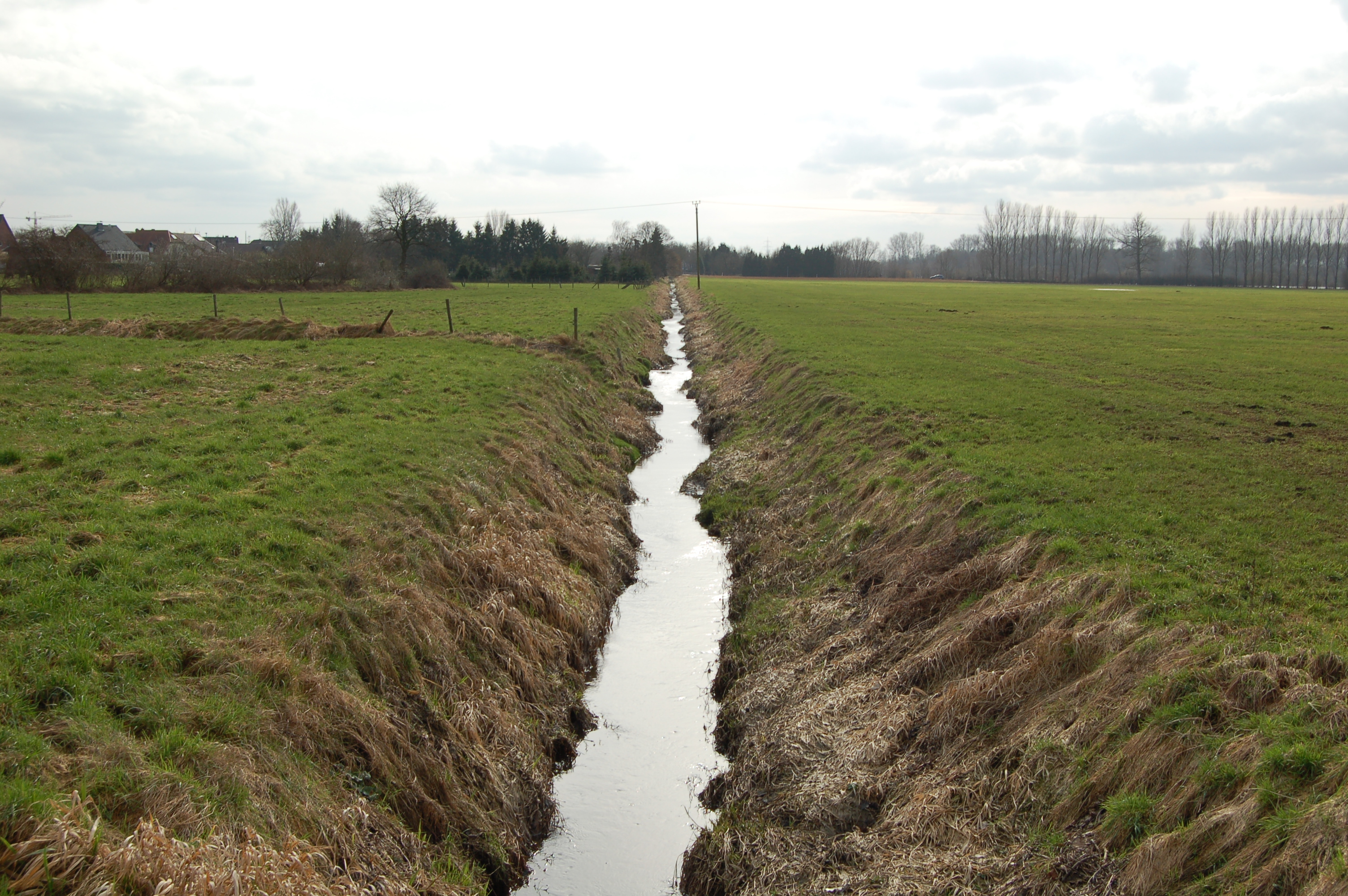 Die Junge Wurm westlich von Theberath, oberhalb der Einmündung des Vongelaaker Baches. Rechts im Hintergrund hinter der Pappelreihe der Lago Laprello.